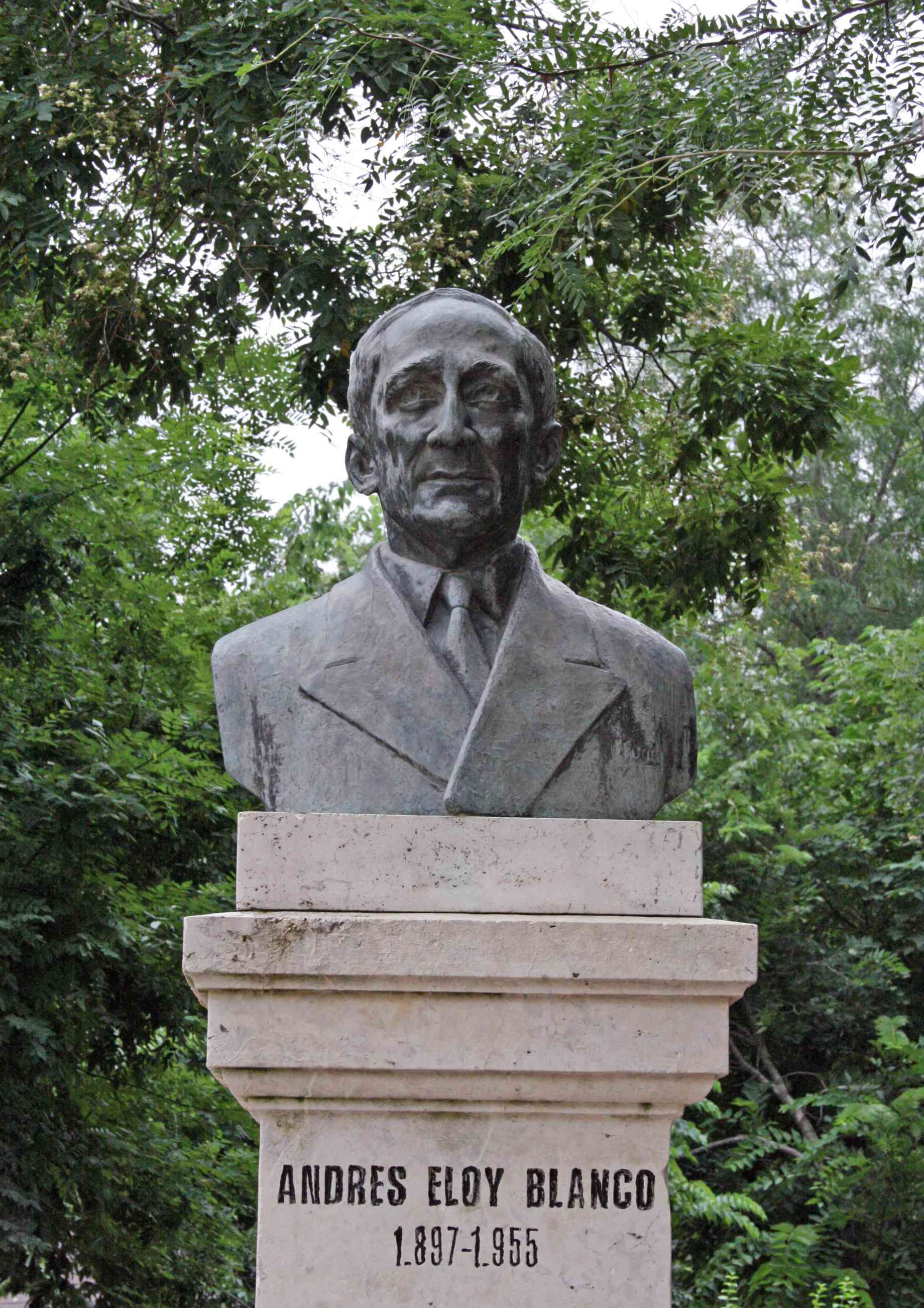 Monumento al venezolano Andrés Eloy Blanco en el Parque del Retiro de Madrid (España). Detalle.